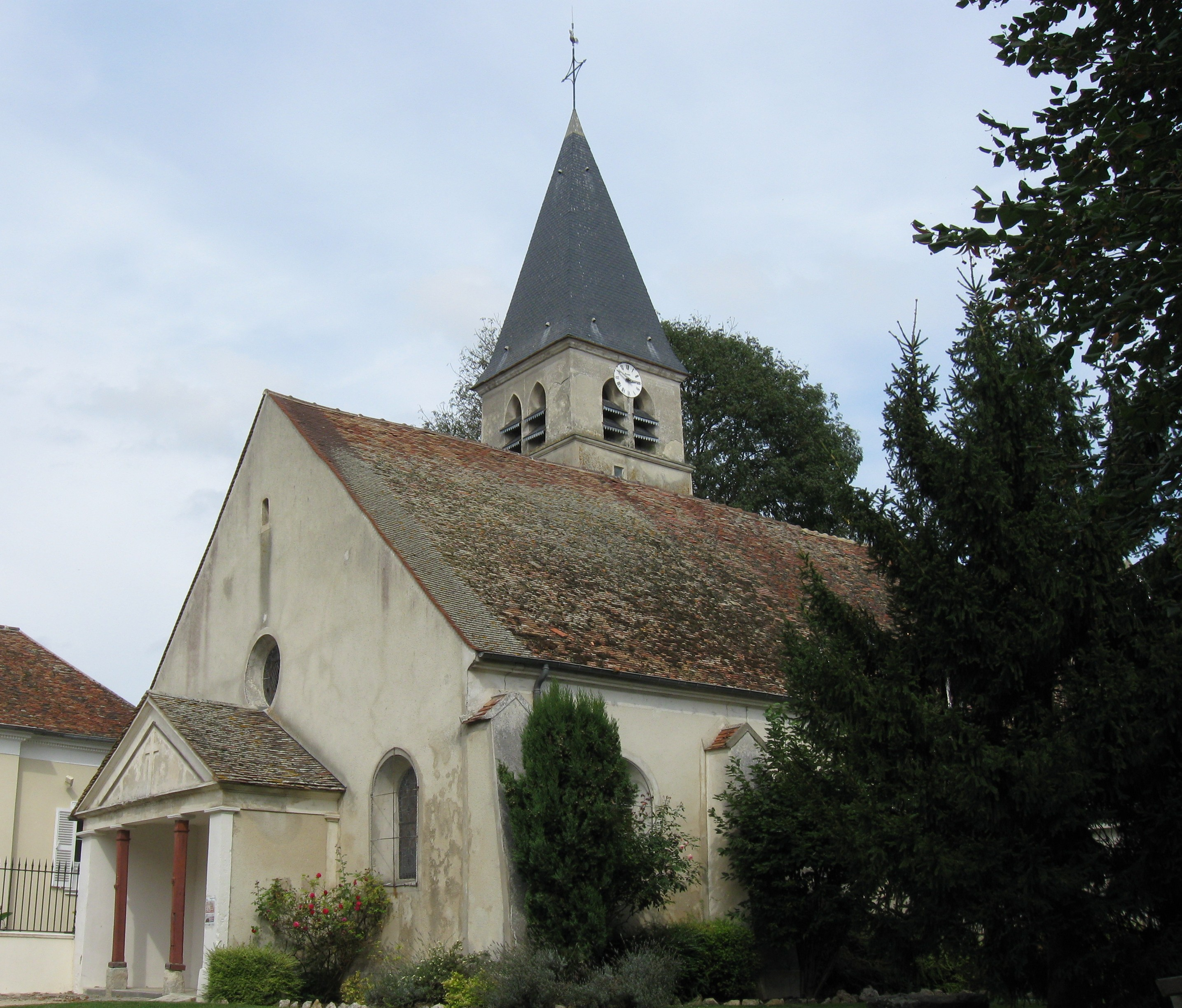 Église Saint-Pierre-et-Saint-Denis de Villeroy. (Seine-et-Marne, région Île-de-France).